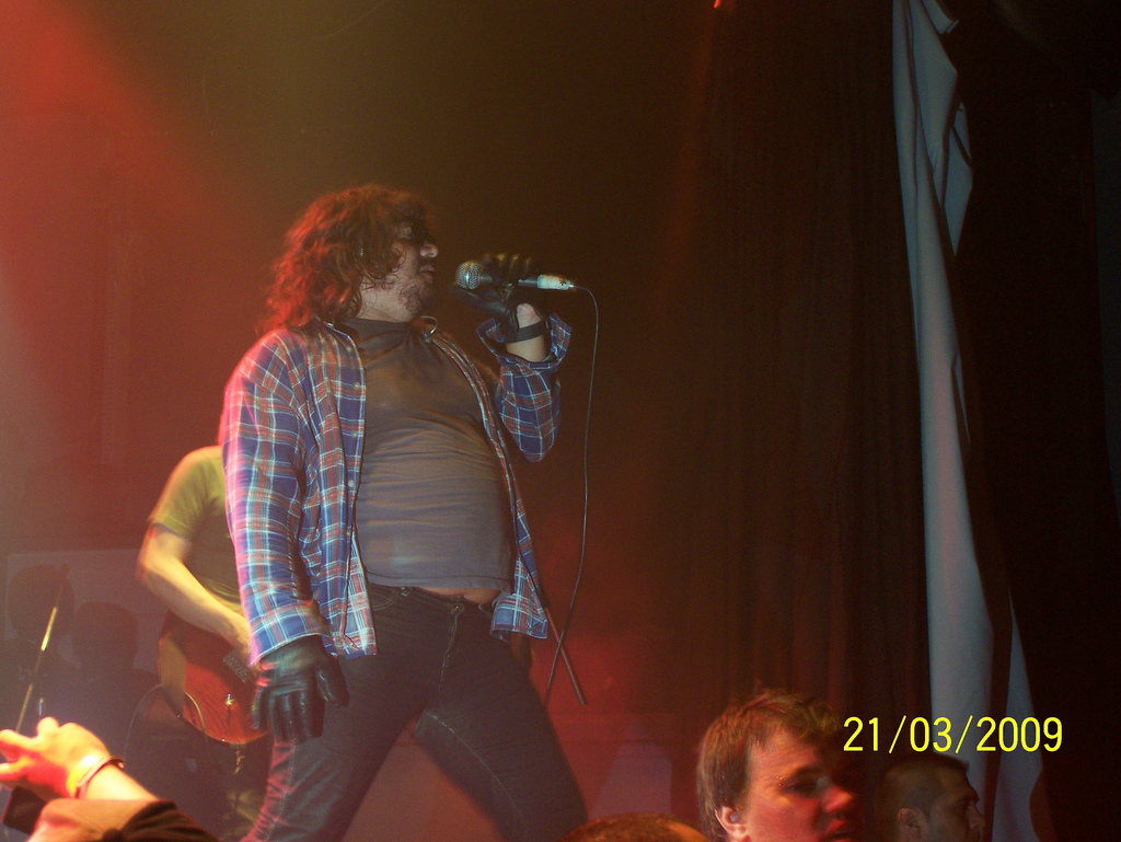 Wallas de Massacre, en un show en vivo en México